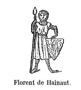 Florent de Hainaut